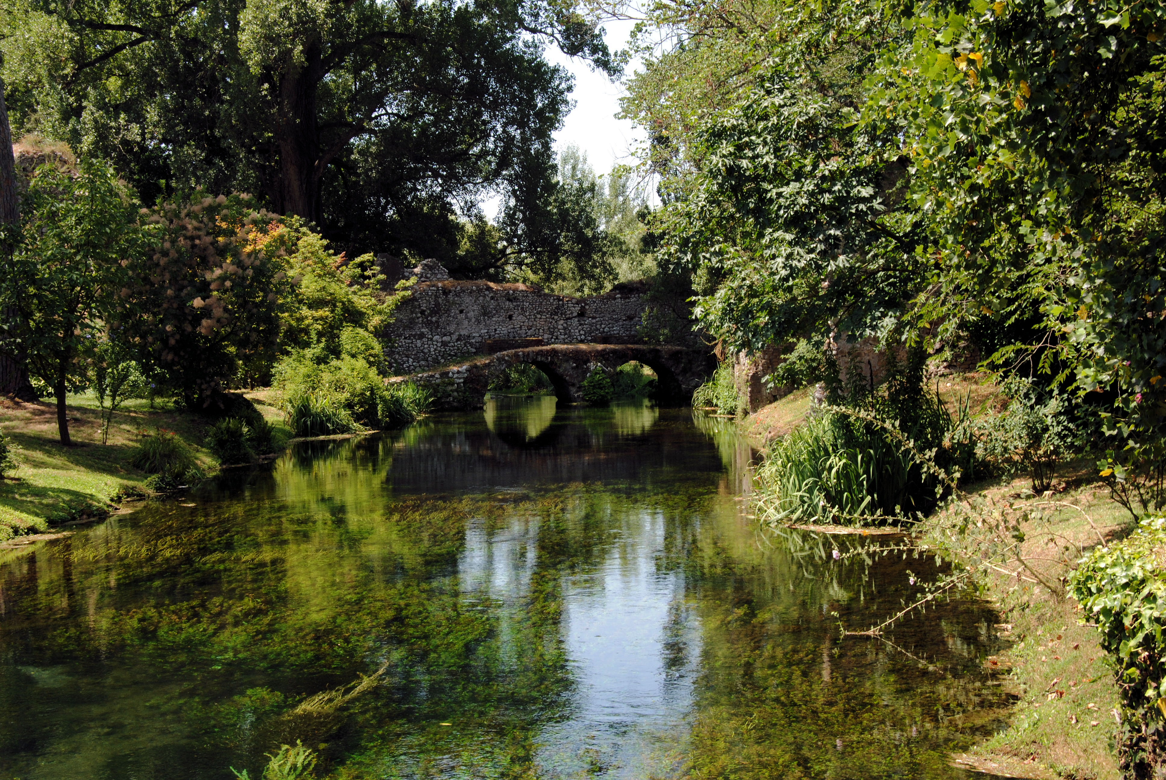 Giardino di Ninfa This is a photo of a monument which is part of cultural heritage of Italy.